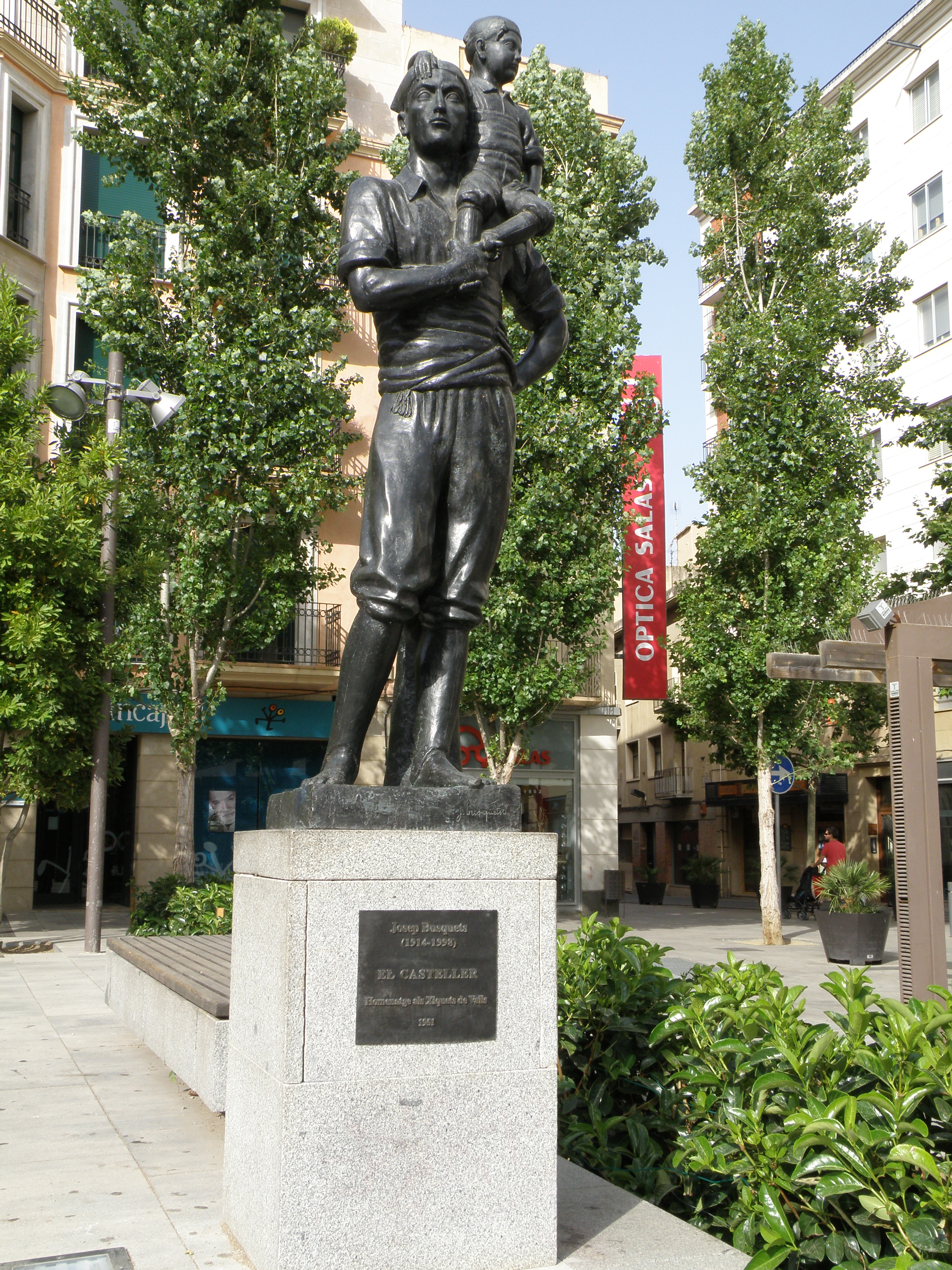 Monument de Valls dedicat als Castellers. Es troba en la Plaça del Pati.